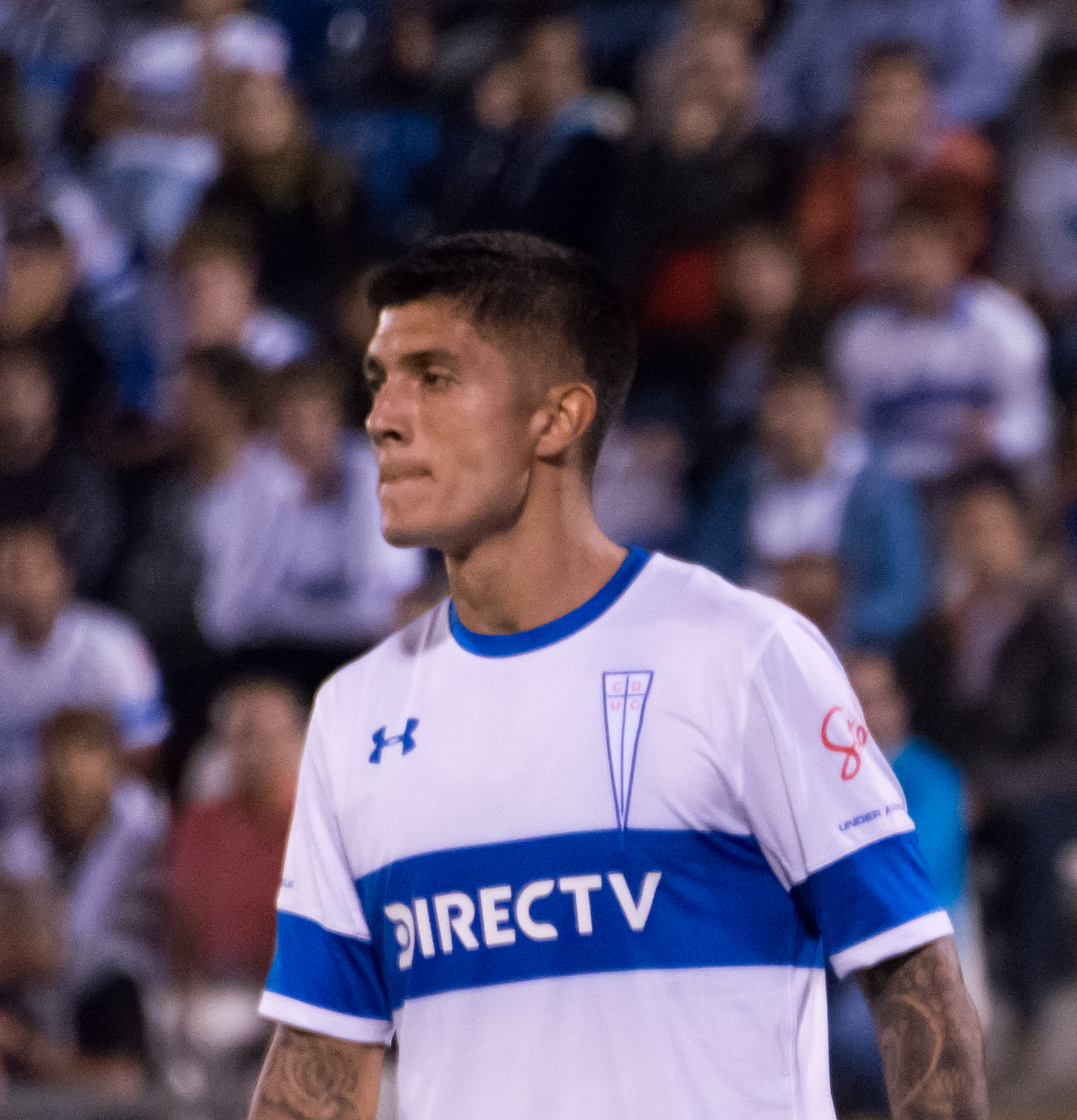 Valber Huerta, Universidad Católica v Rosario Central, Estadio San Carlos de Apoquindo, Las Condes, Santiago, Chile.